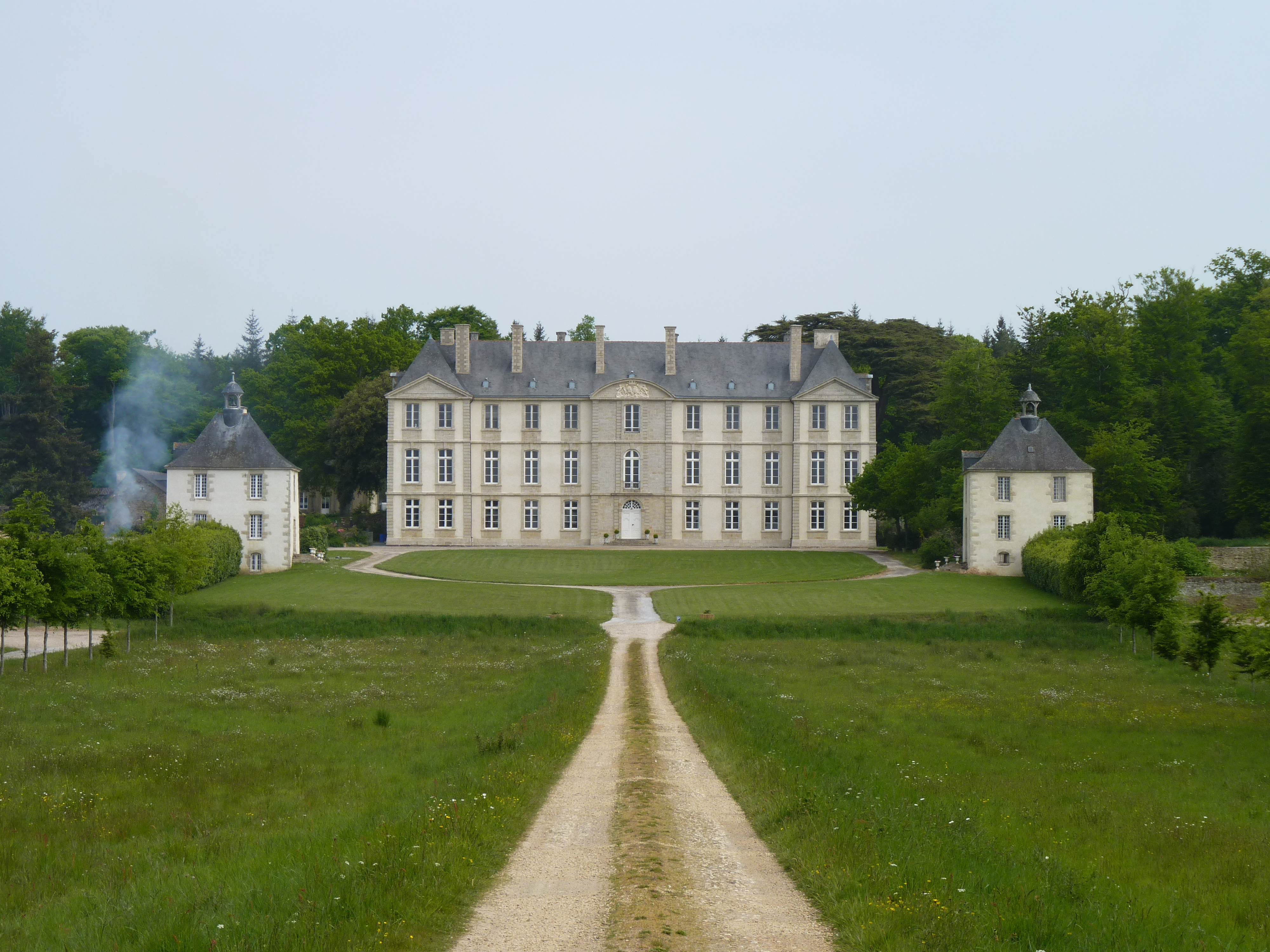 Châteauy compris ses dépendances, pavillons d'entrée, parc et étangs